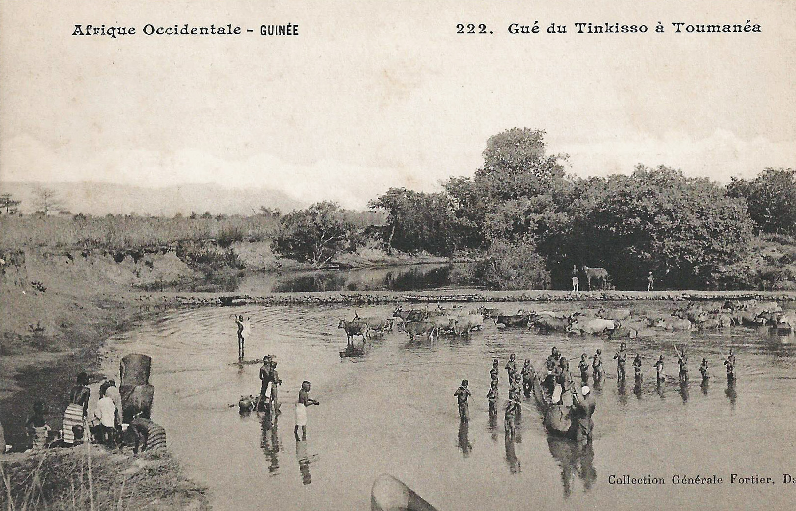 François-Edmond Fortier, Gué du Tinkisso à Toumanéa. Afrique Occidentale. Guinée